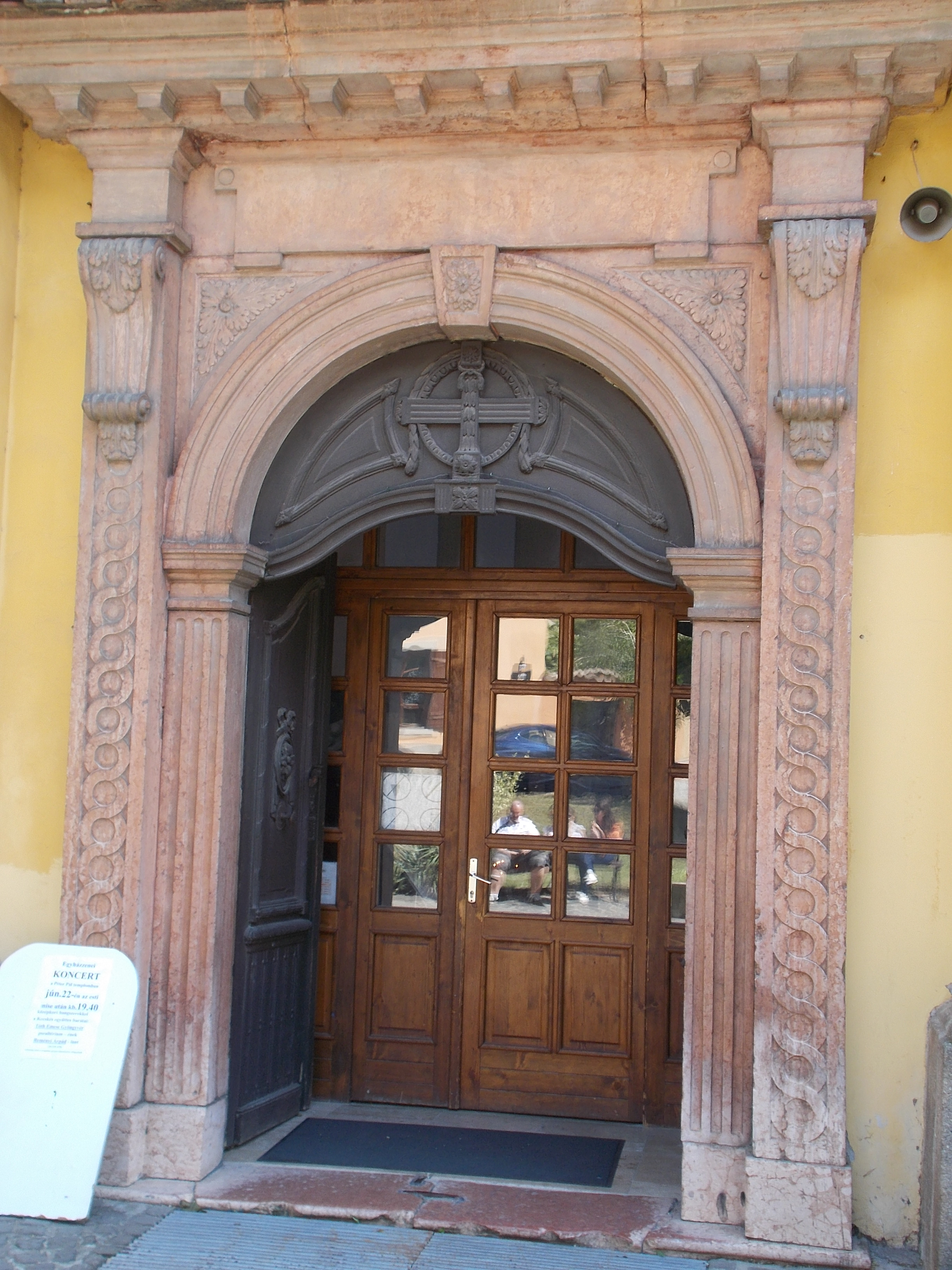 Péter-Pál Katolikus templom. Északi (Péter-Pál utcai) kapu. Műemlék ID 7387. A volt Csiprovacska ortodox templom, barokk, 1753-1791. - Magyarország, Szentendre, Kucsera Ferenc utca 1 és és a Péter-Pál utca sarok. This is a photo of a monument in Hungary. Identifier: 7387